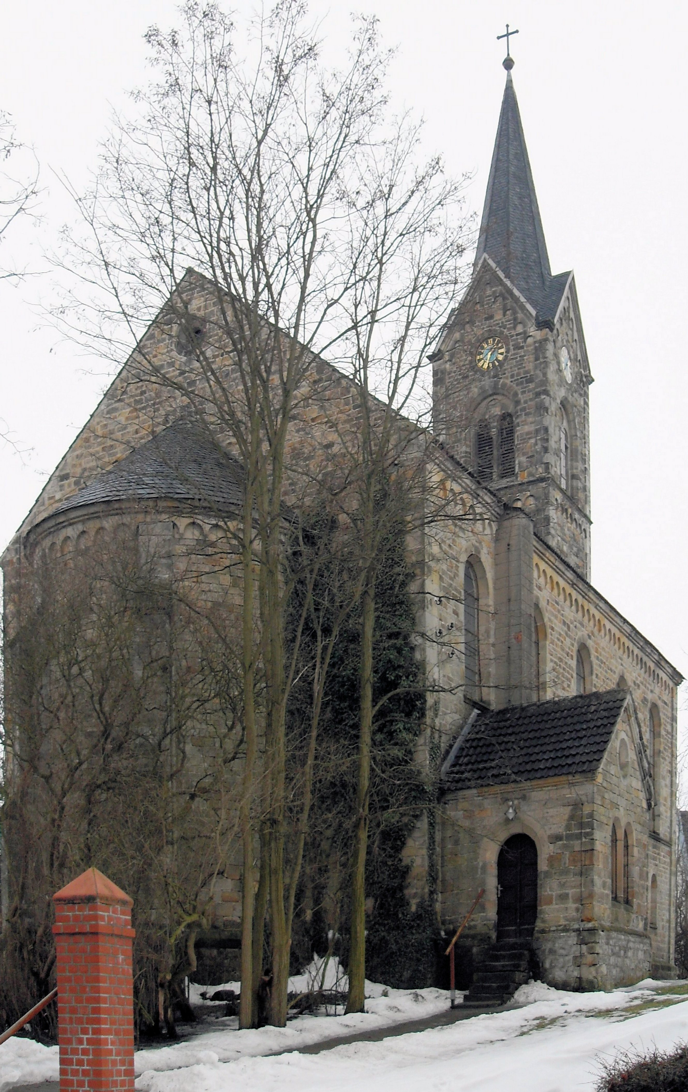 Kirche in Druxberge, Gemeinde Eilsleben, Landkreis Börde, Deutschland